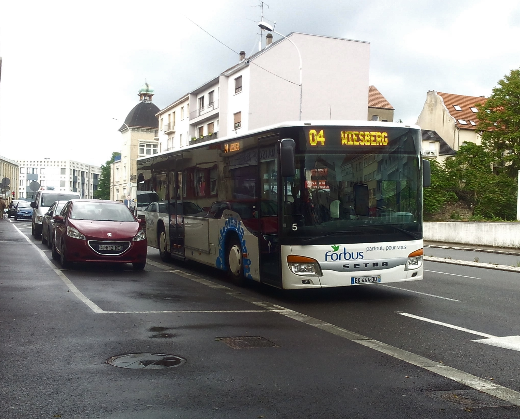 S 415 NF n°5 de Forbus aux abords de la gare de Forbach